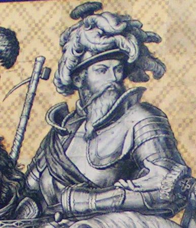 Dresden Fuerstenzug, Moritz von Sachsen